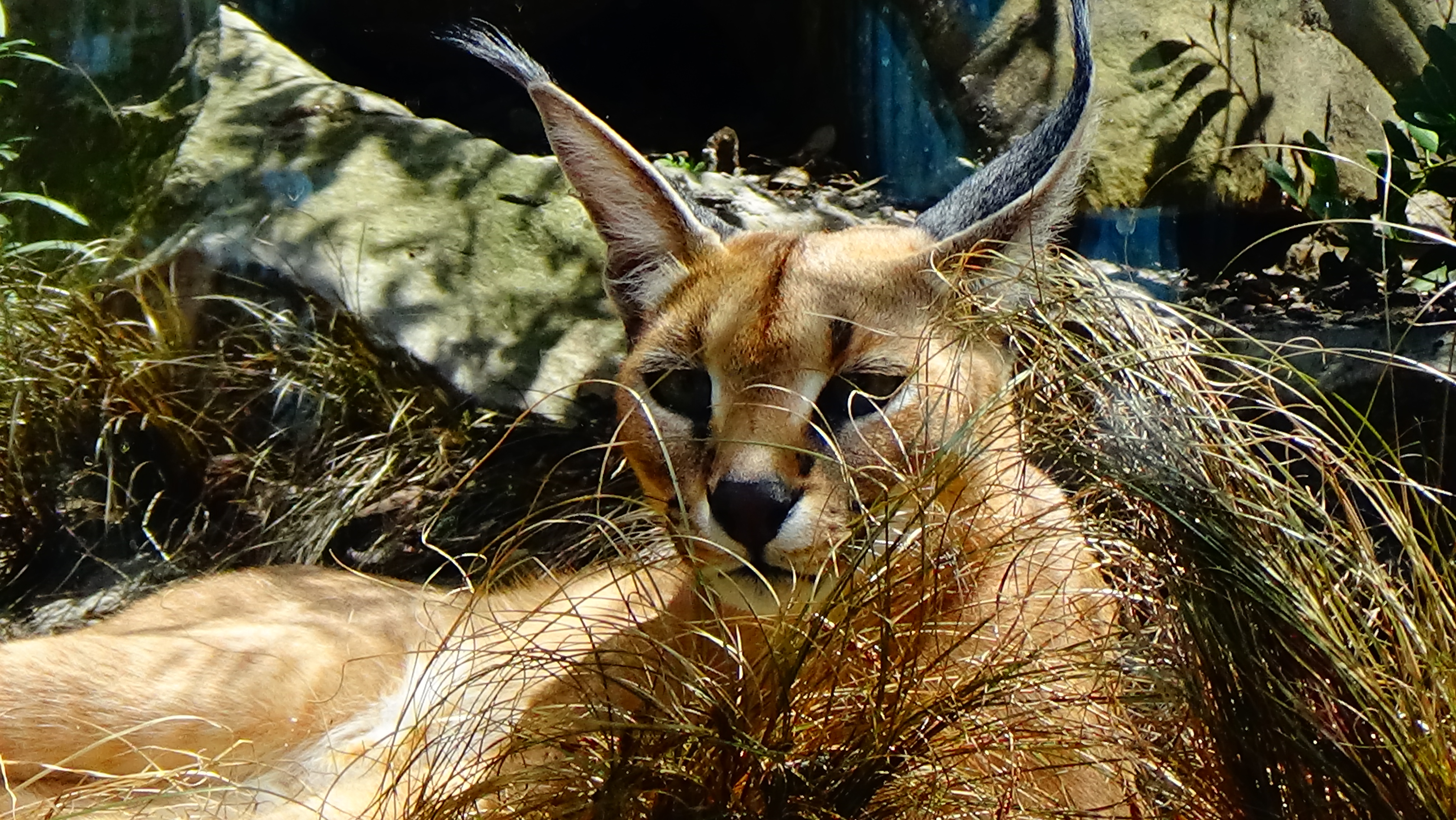 Caracal caracal - caracal - lynx du désert - lynx de Perse